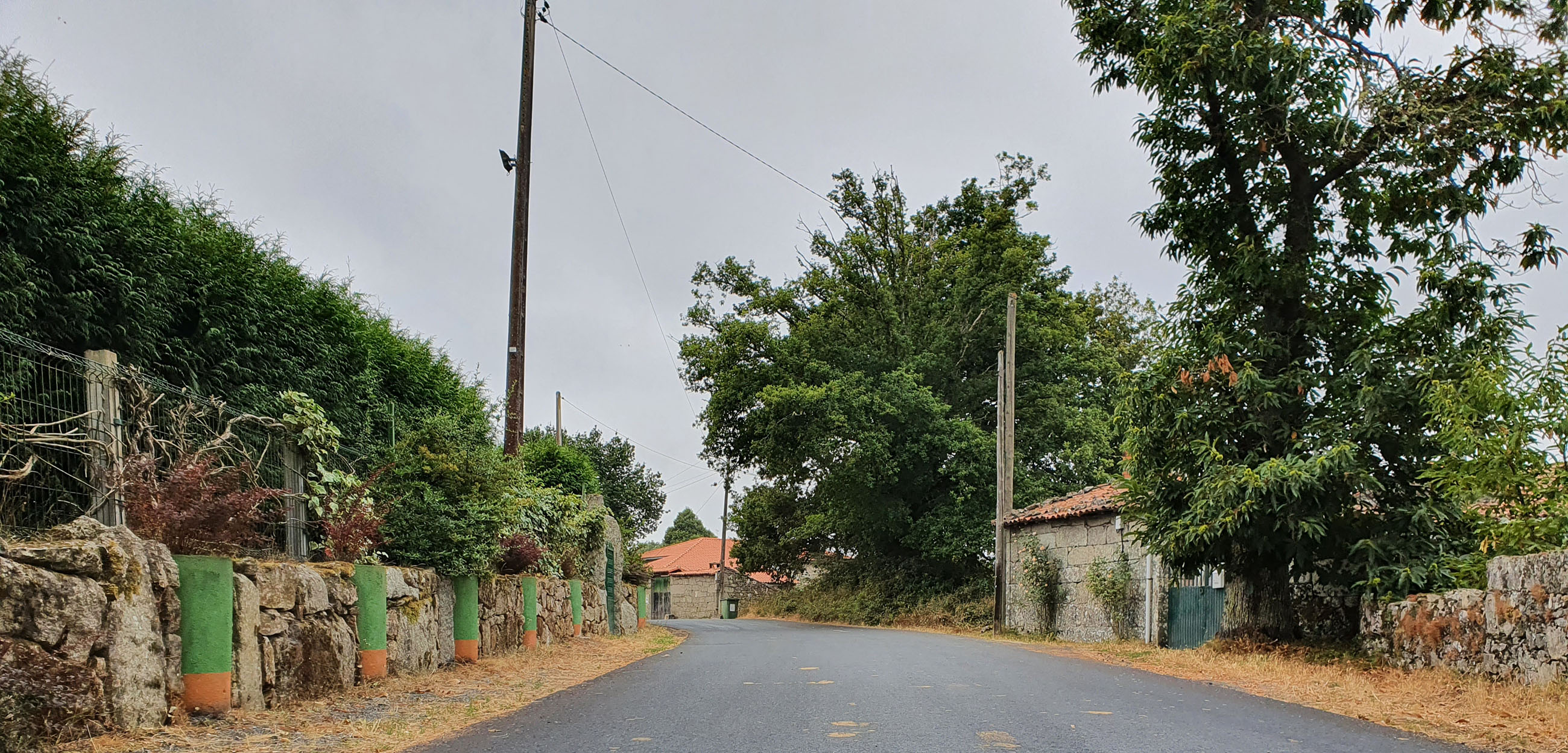 Lugar de Pena Garceira, na parroquia de Vilapoupre (Antas de Ulla). Trátase do núcleo máis ao sur da parroquia, xa albiscando Montecelos, na veciña Dorra.